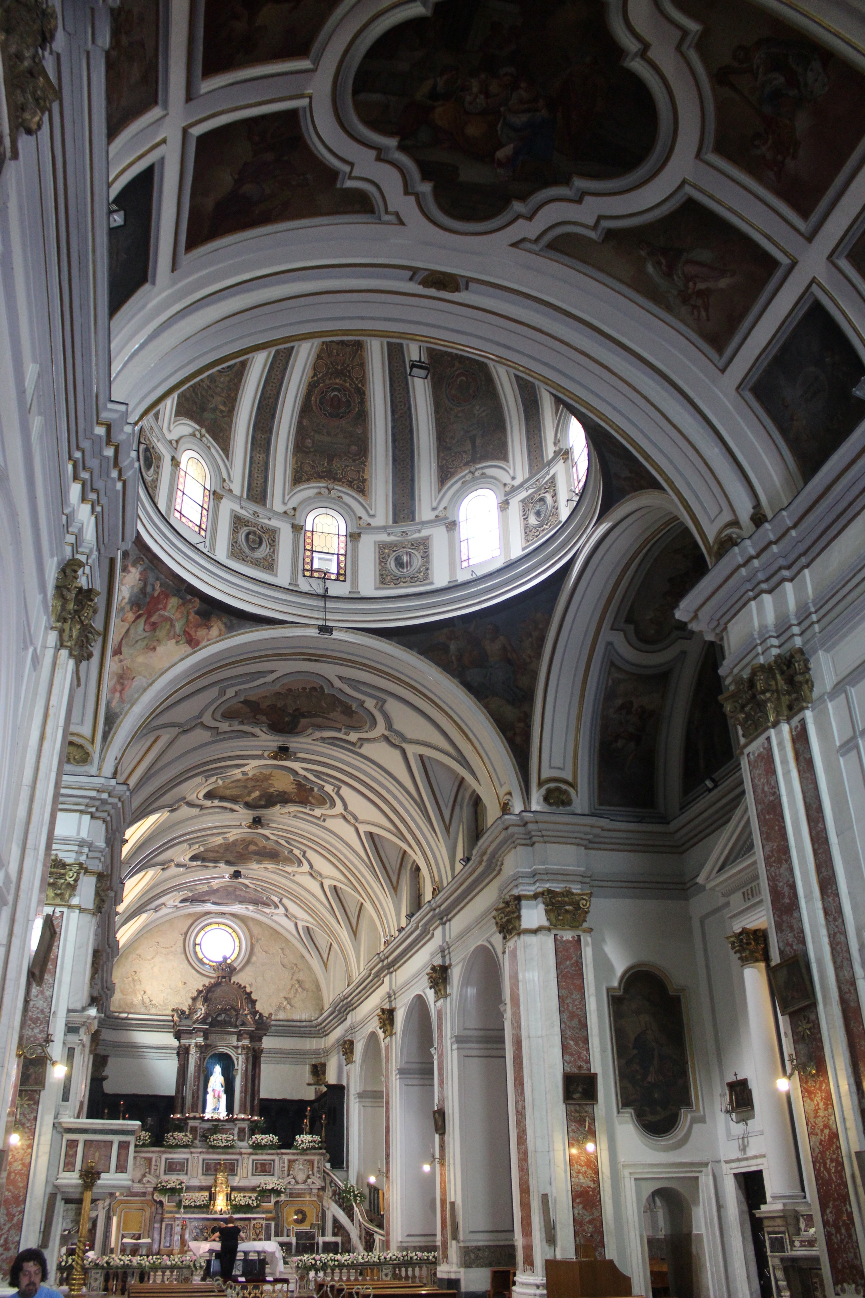 Nápoles. Santa Maria di Piedigrotta. Interior.